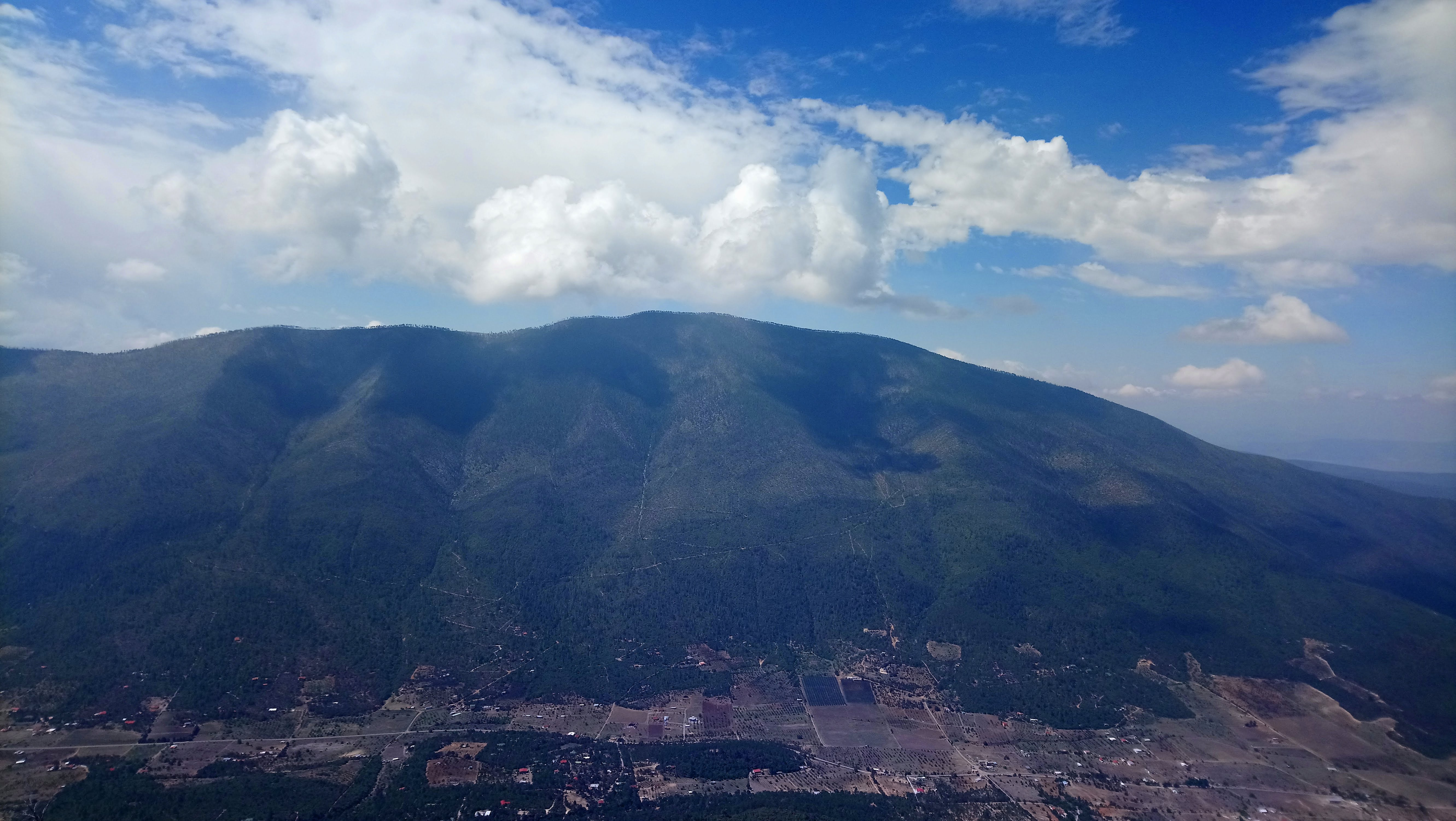 Cerro de la Viga desde Cerro Rancho Nuevo